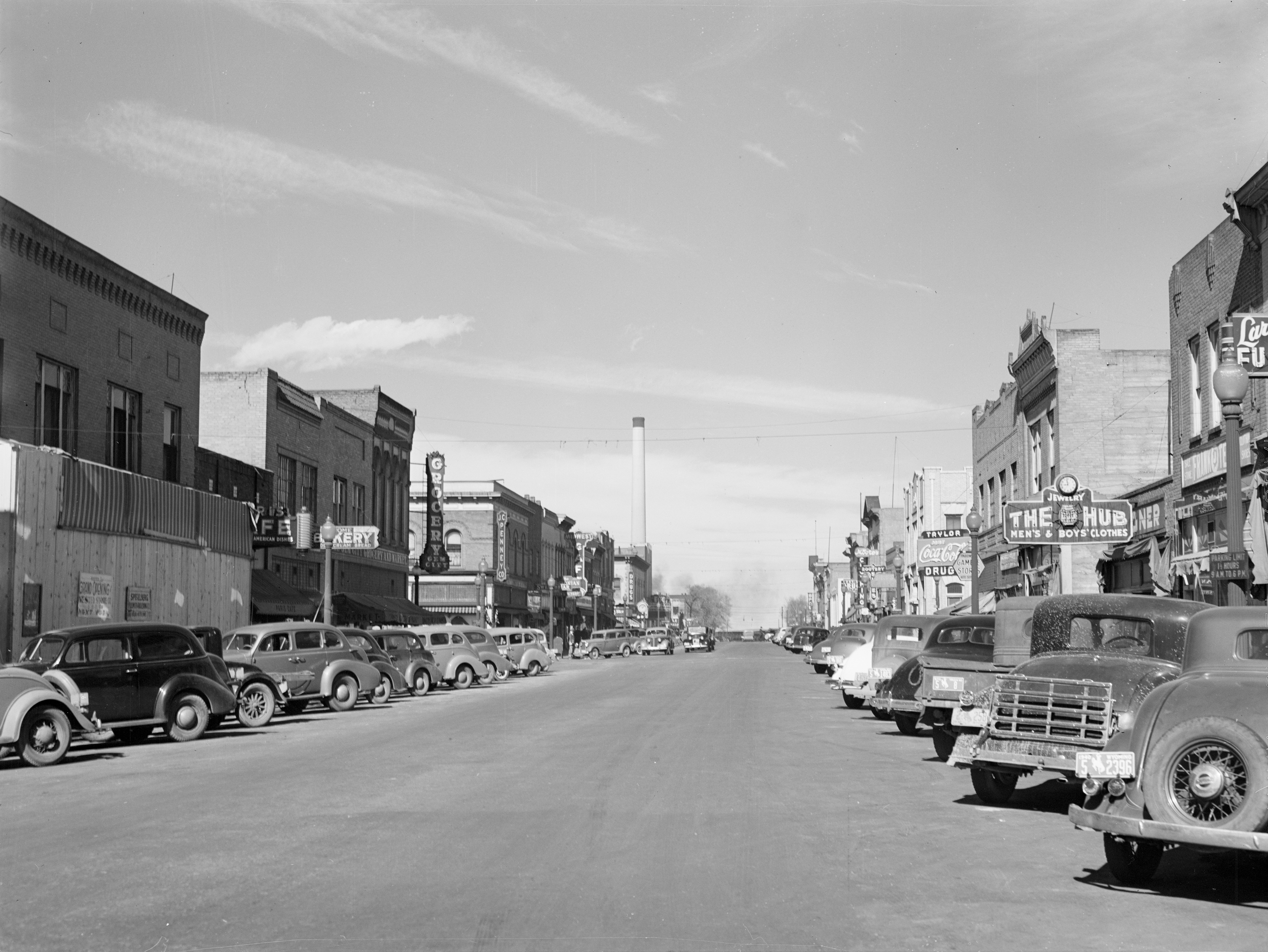 Main street. Laramie, Wyoming, 1940